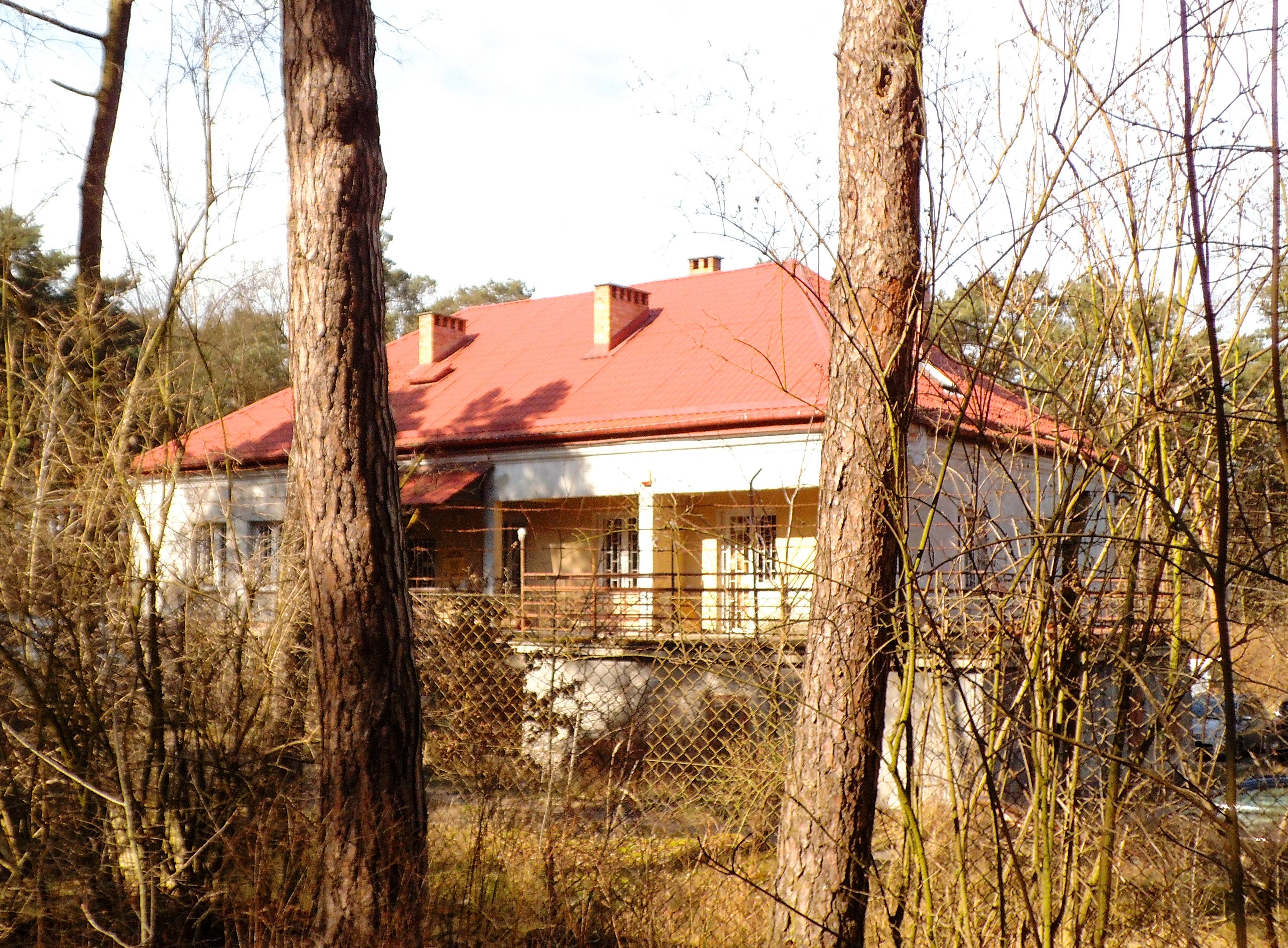 Stacja węzłowa systemu ROKADA w Toruniu